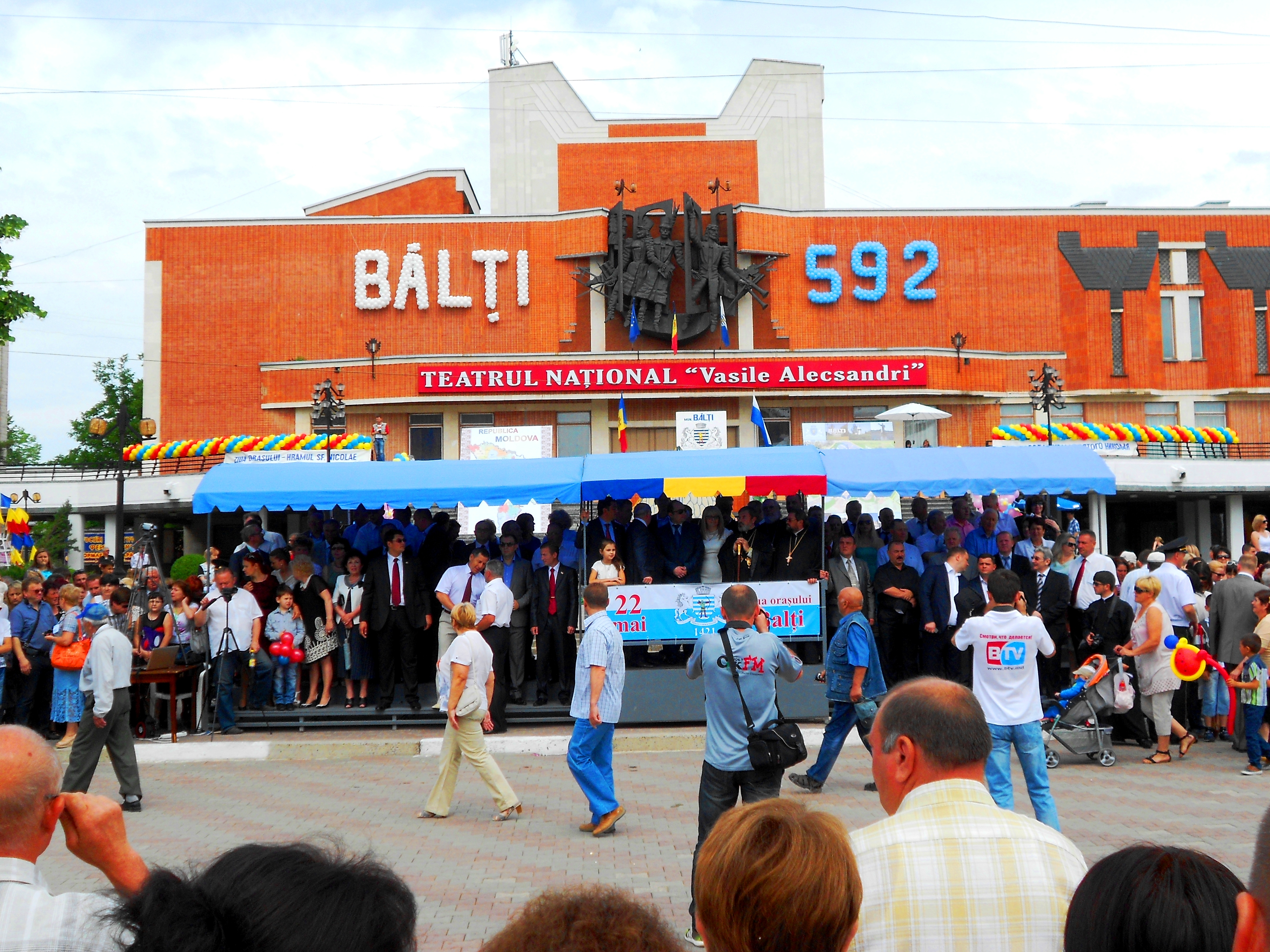 Ziua orașului Bălți în 2013